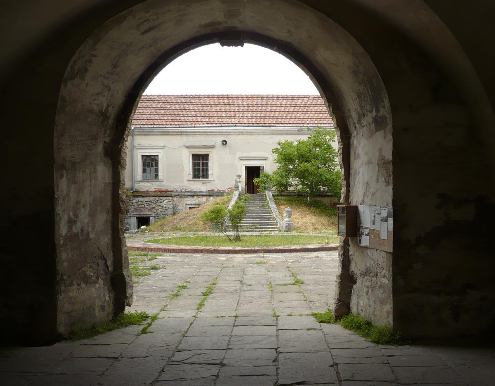 Dziedziniec zamku w Świrzu na Ukrainie. Zamek stanowił pierwotnie własność książąt Świrskich, od XVII wieku należał do rodu Cetnerów, zniszczony podczas wojen kozackich w 1648, zdobyty przez Turków w 1672. Po pierwszym rozbiorze Rzeczypospolitej znalazł się na obszarze zaboru austriackiego. Ostatnimi właścicielami przed 1939 byli Irena z Lamezanów i jej mąż Tadeusz Komorowski, późniejszy dowódca Armii Krajowej i powstania warszawskiego